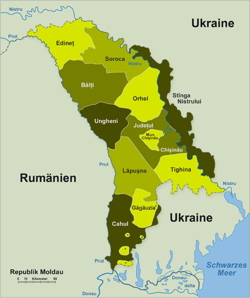 Gebiete in Moldawien